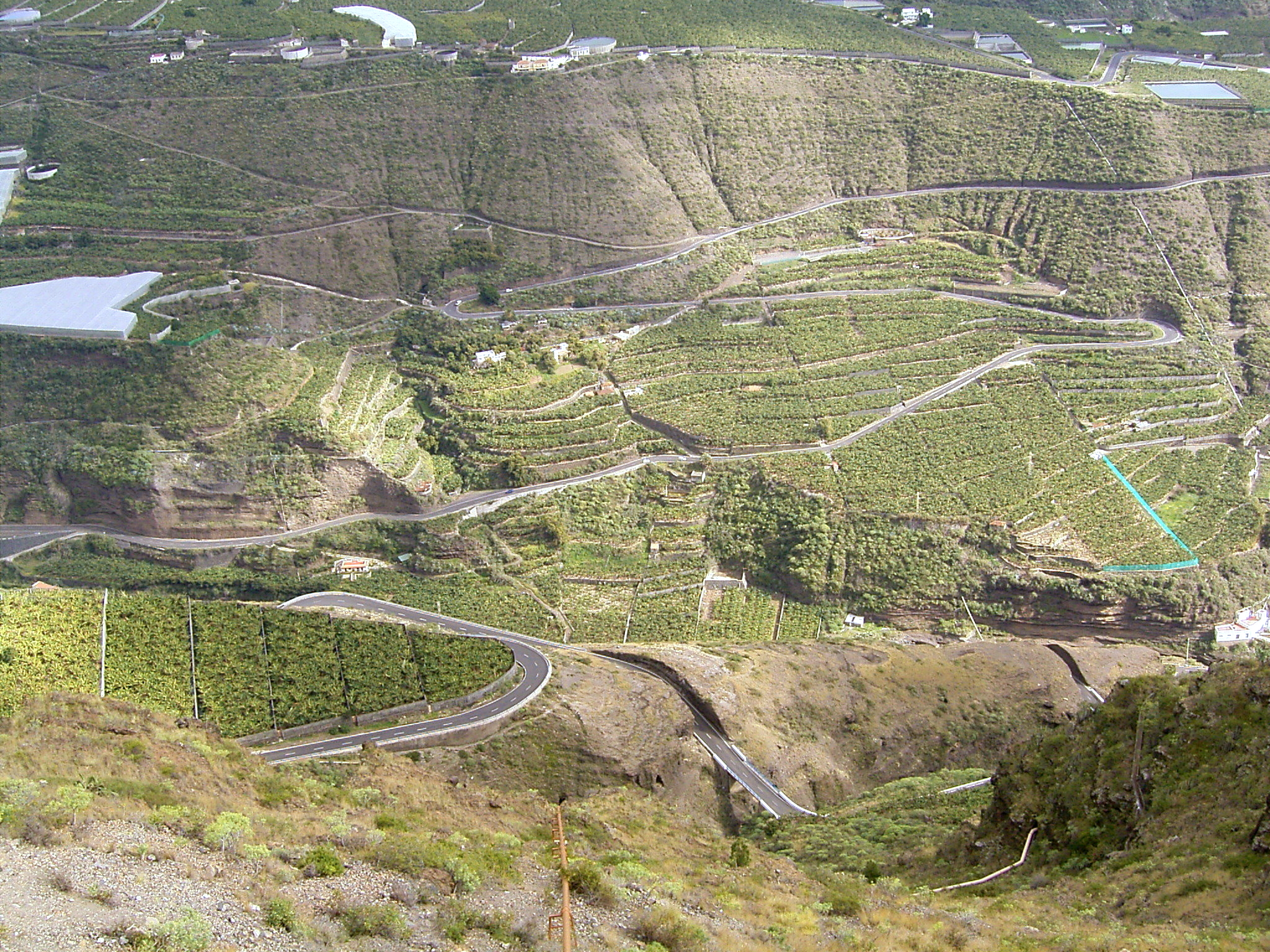 Tazacorte, La Palma, Canary Islands